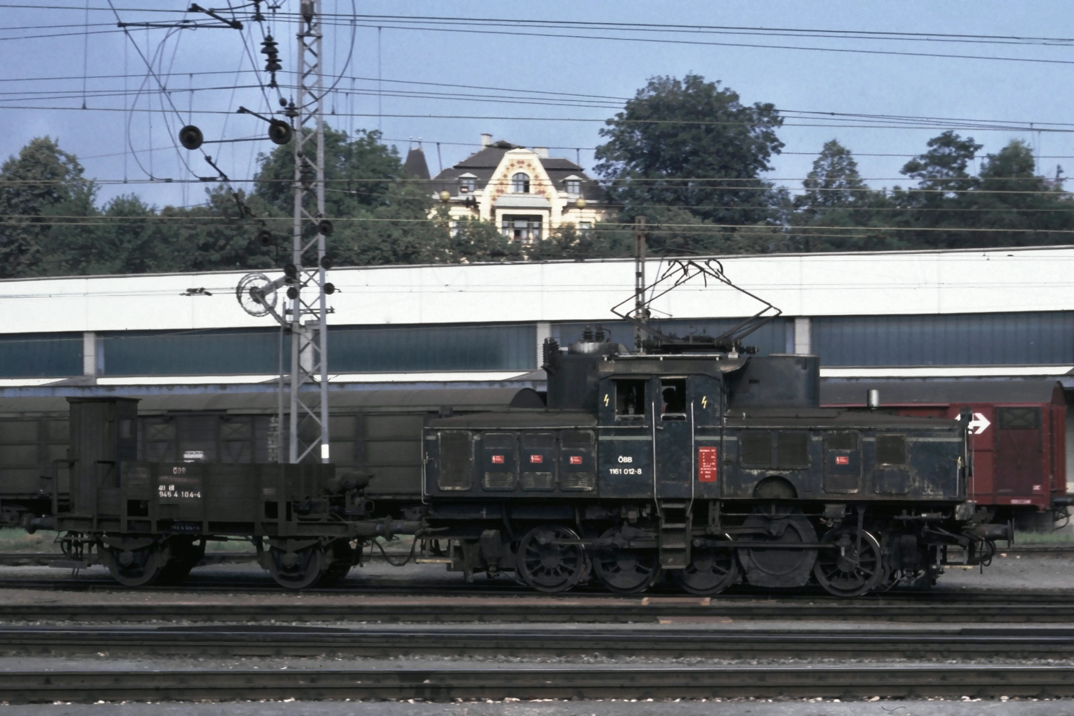 ÖBB_1161_012-8 in Villach Südbahnhof